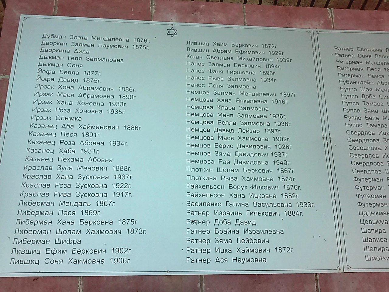 Часть списка убитых евреев деревни Камень Лепельского района, убитым нацистами 17 сентября 1941 года. Находится на памятнике, расположенном примерно в полукилометре севернее деревни, после кладбища, слева от дороги в урочище Борки